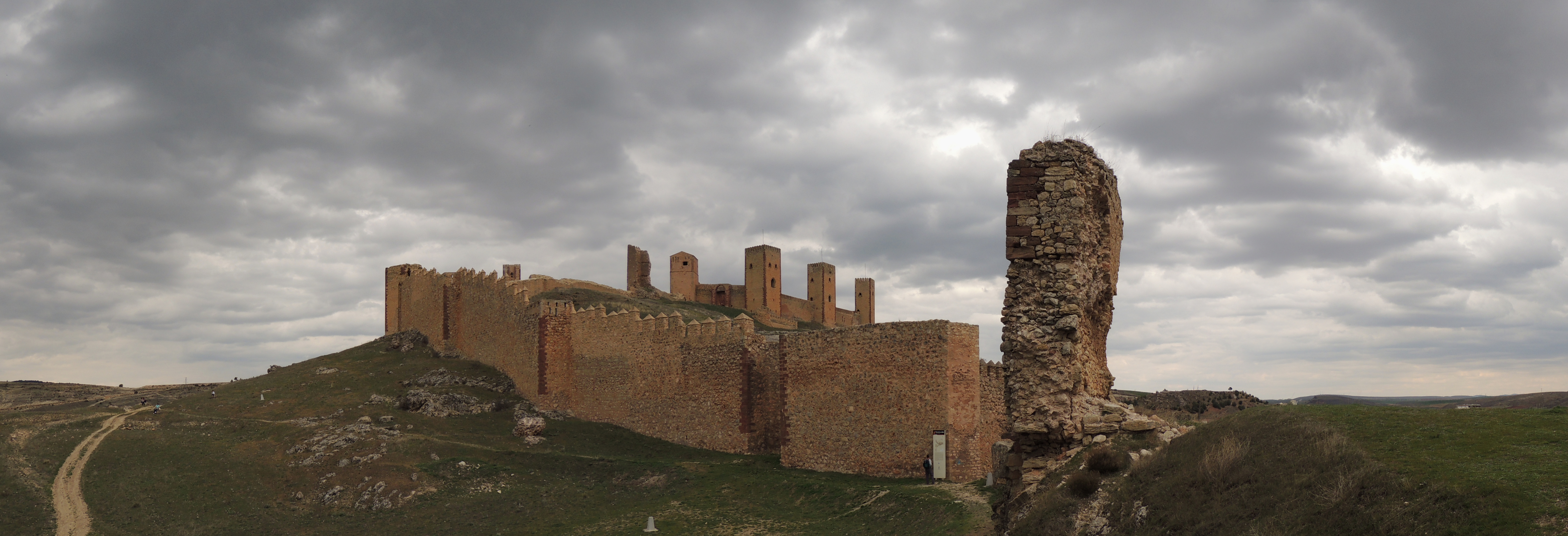 Panorámica del Castillo de Molina de Aragón desde el Prao de los Judios